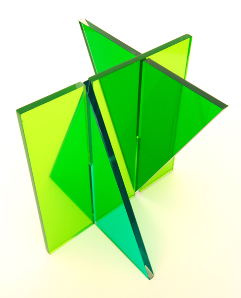 Escultura